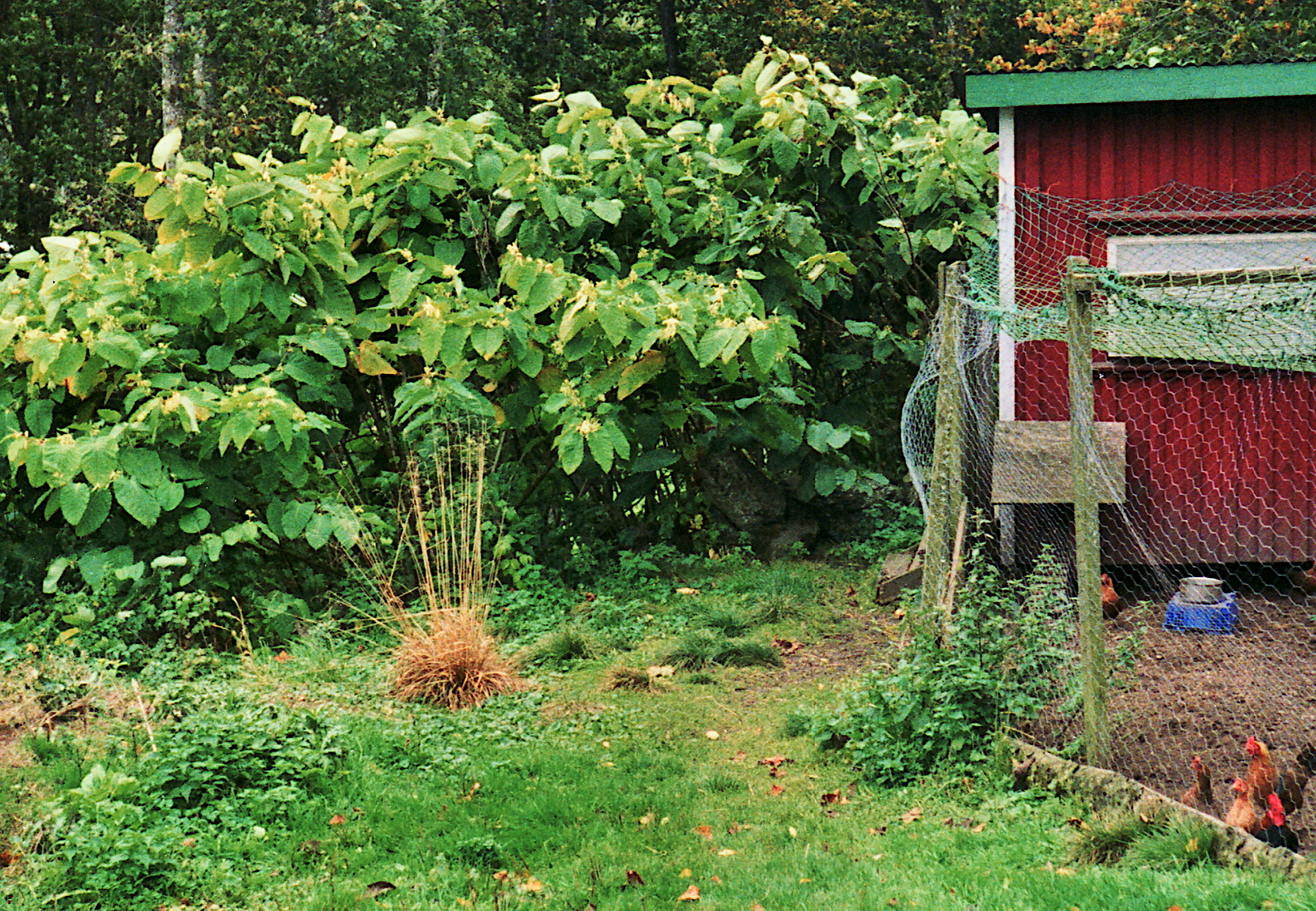 Planterat och delvis förvildat bestånd av jätteslide, bredvid hönshus med hönsrasen svensk dvärg. Plats: Kimmersbo, Lindome, september 2003.